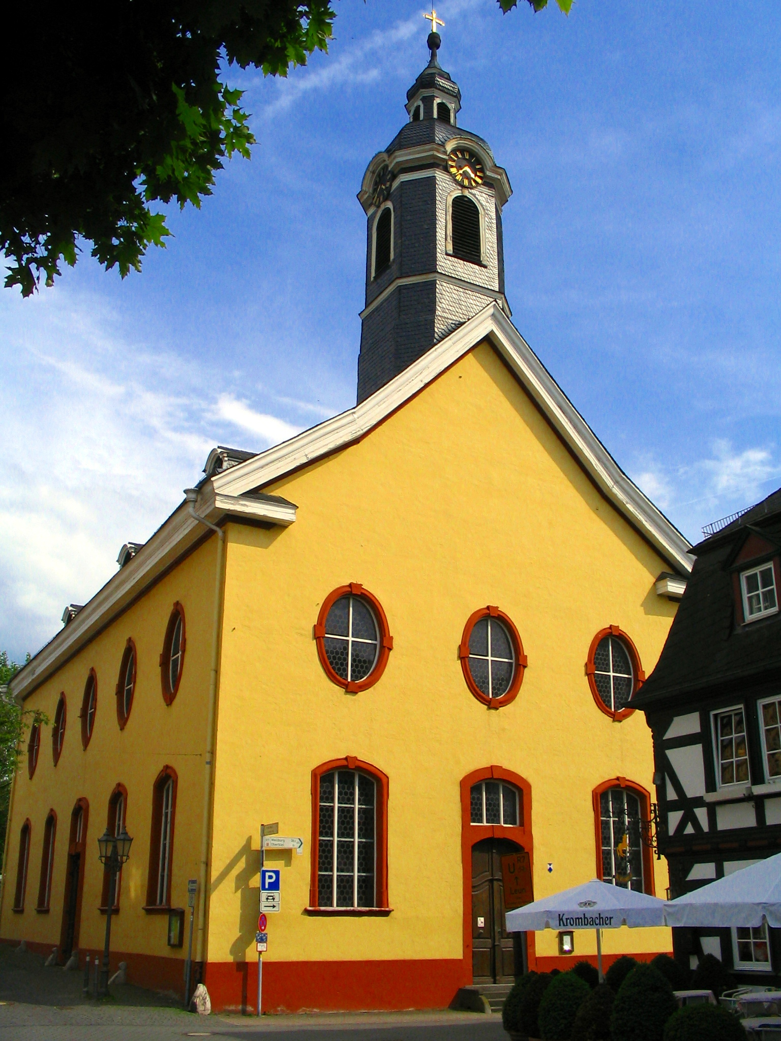 Offene Hospitalkirche in Wetzlar